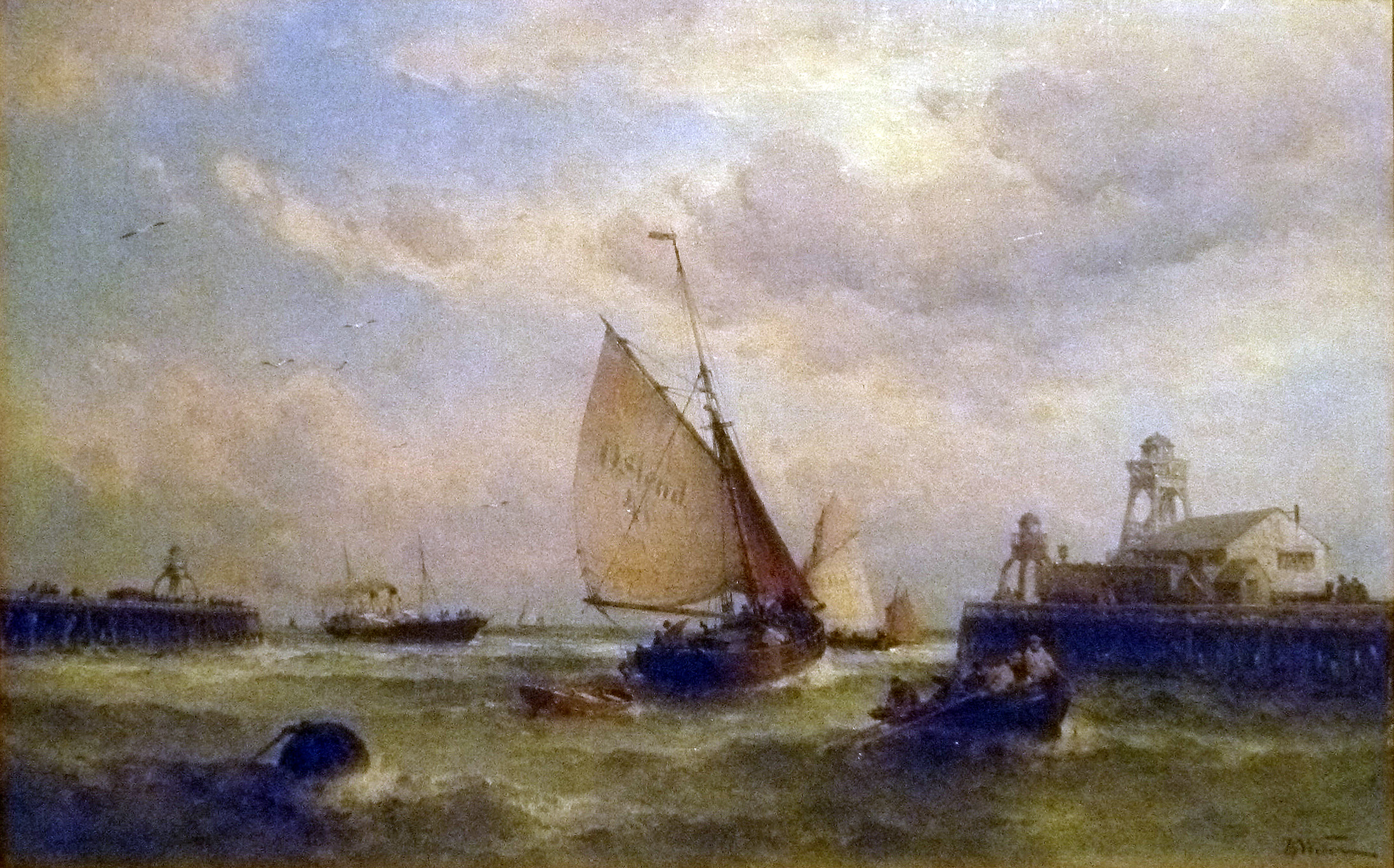 "Havengeul van Oostende" (1875), olieverf op doek door Theodor Weber (1838-1907); Collectie Stad Oostende in MuZee